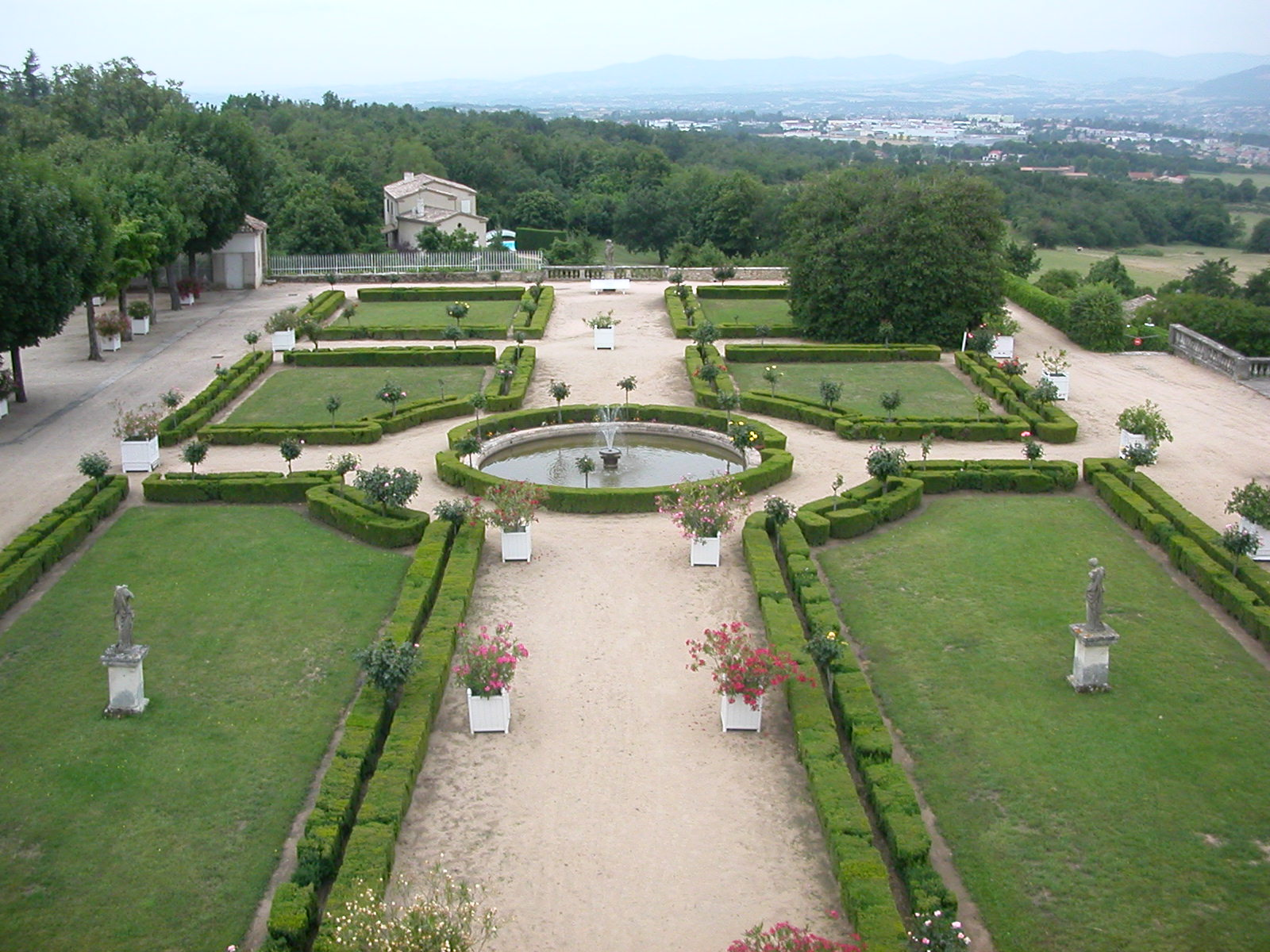 Saint-Clair (Ardèche) Gourdan parterre